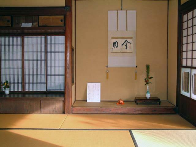 中文（台灣）: 木戶孝允少年時期的習字掛軸